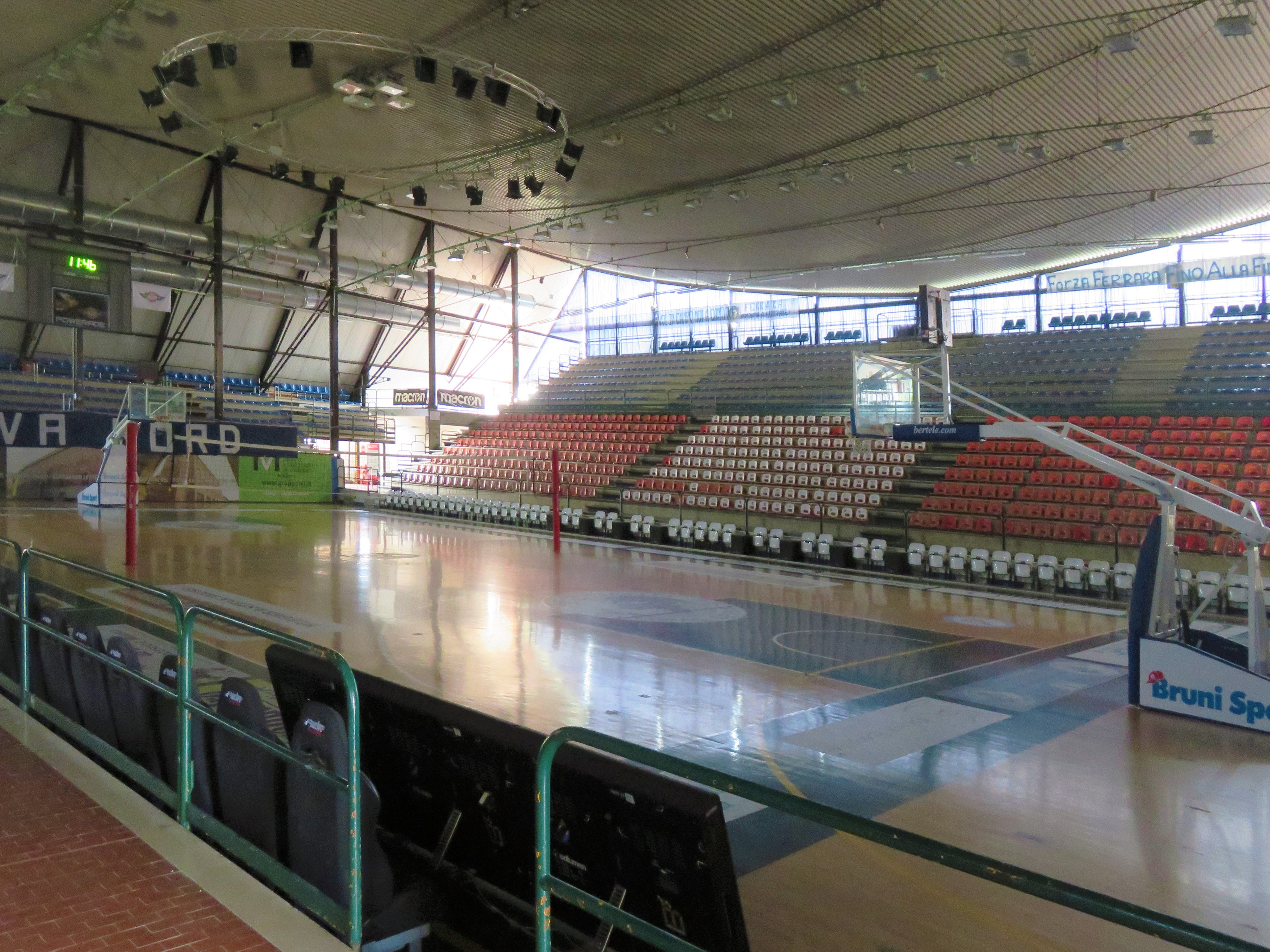 Palasport Ferrara - Interno